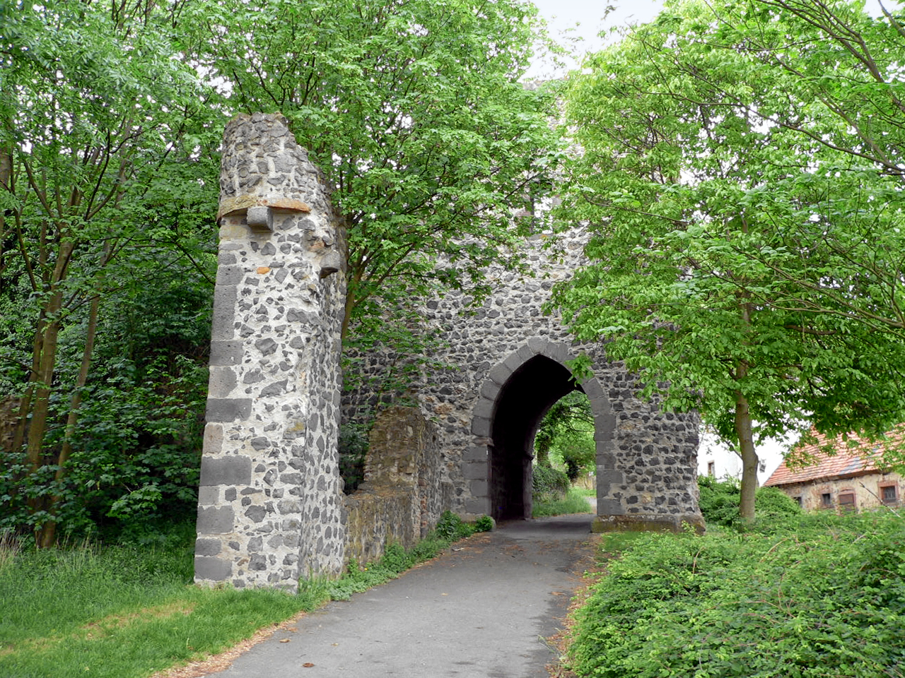 Spätgotisches Vortor im Hirschgarten der Burg Münzenberg in Hessen, Germany